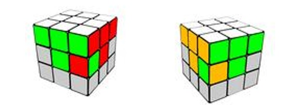 مشکل